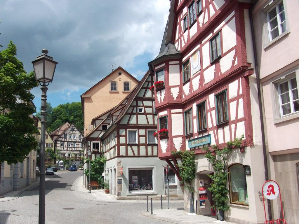 Ortszentrum in Creglingen